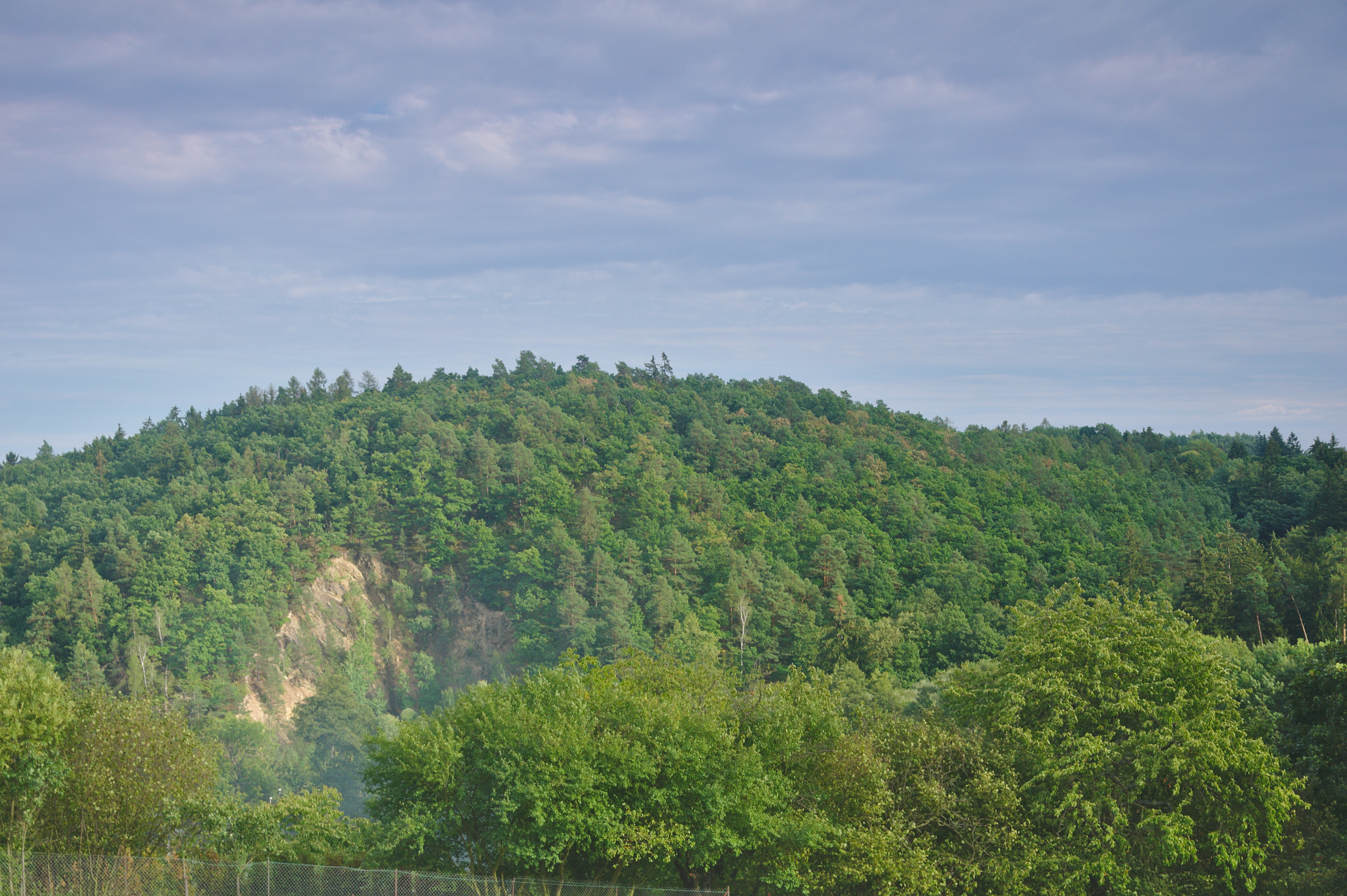 Hrad u Bílovic - pohled přes údolí ze západu, Bílovice-Lutotín, okres Prostějov